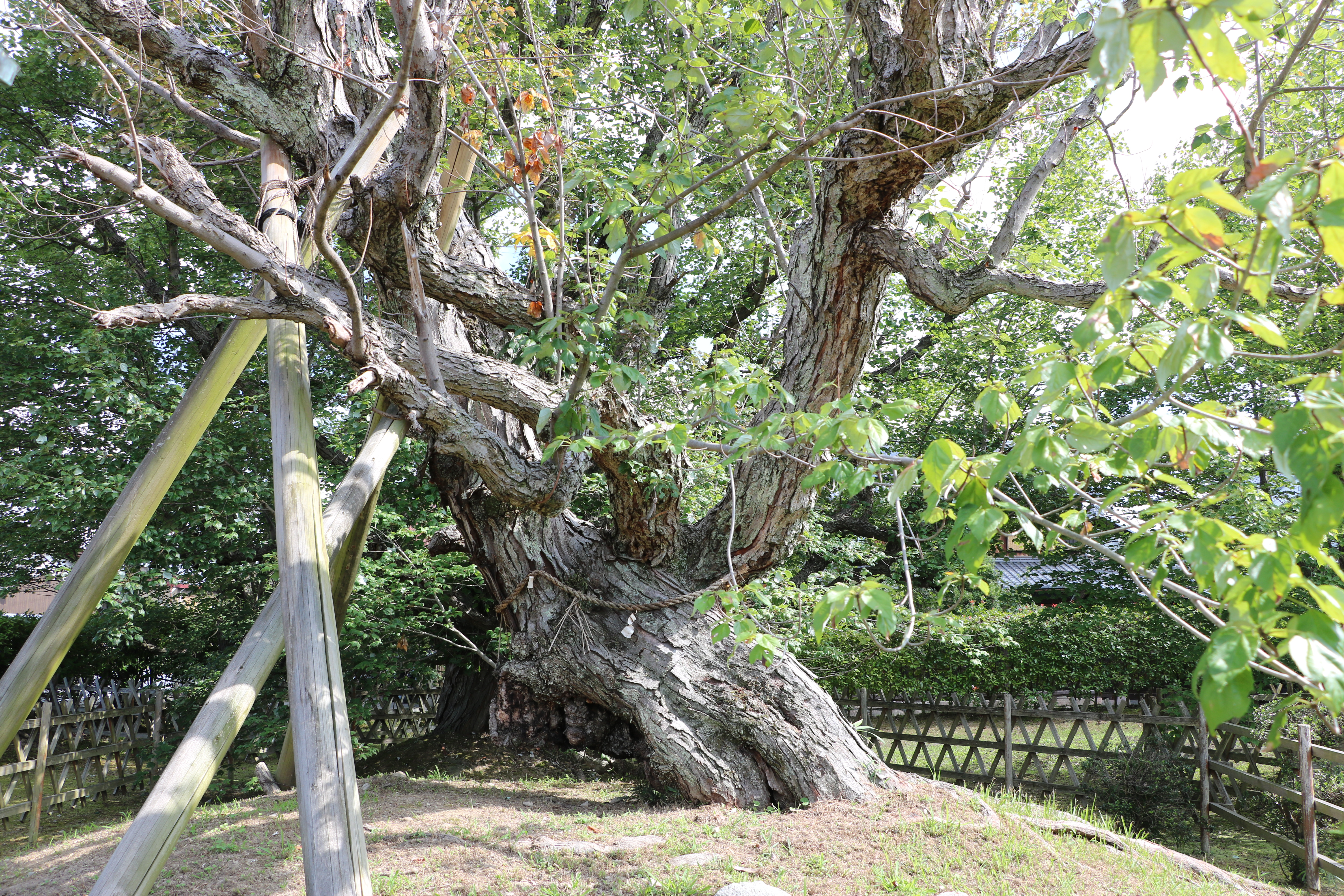 北花沢のハナノキ（国指定天然記念物、滋賀県東近江市）